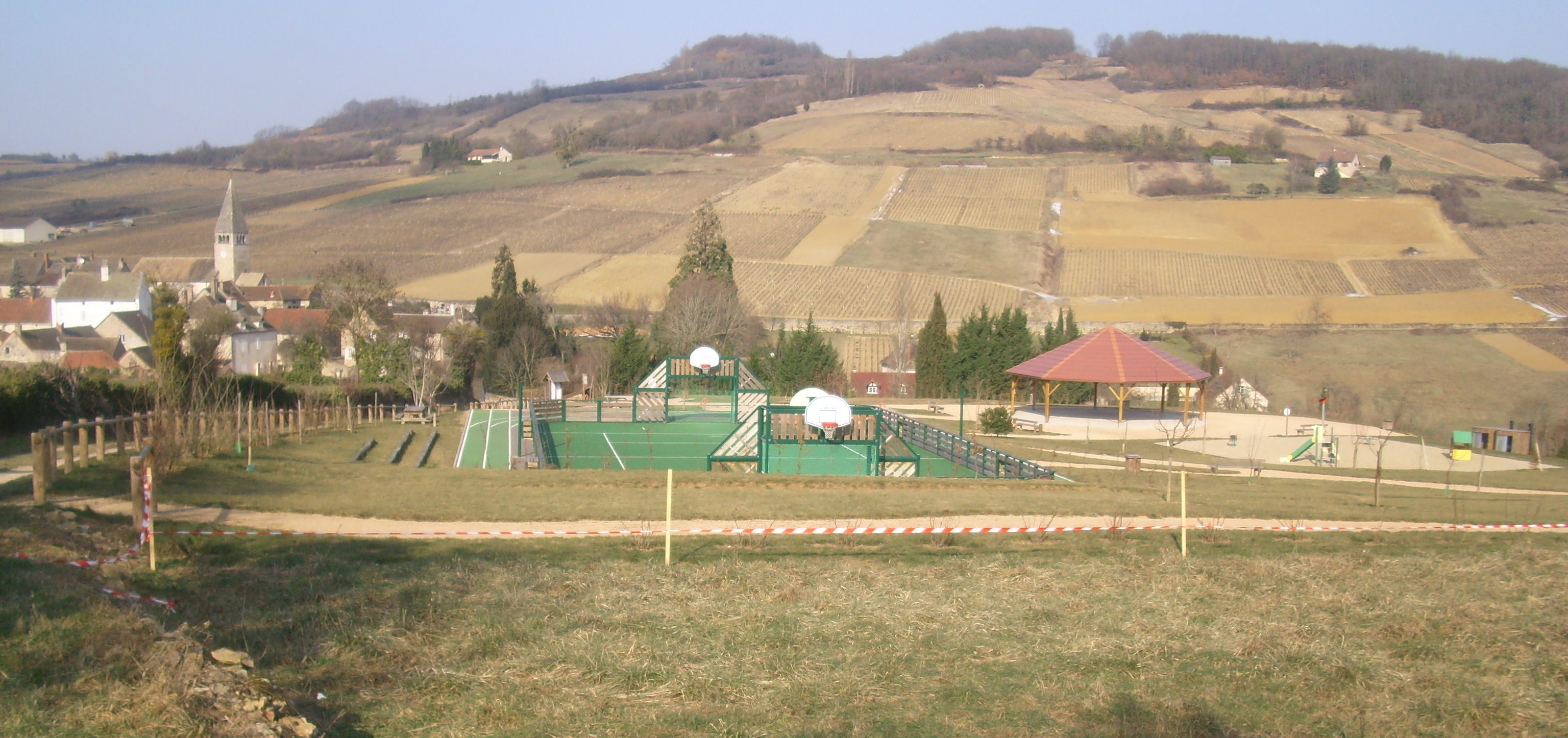 Aire de loisirs de Jambles (71) : Agorespace et kiosque